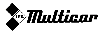 Das Logo vom Multicar M25